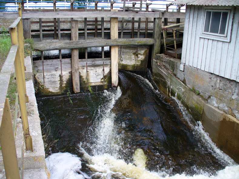 Romaszkówka w pow. sokólskim, młyn wodny. Fotografia wykonana przez Jana Burnewicza 16 sierpnia 2006 r. w czasie odwiedzin stron rodzinnych.